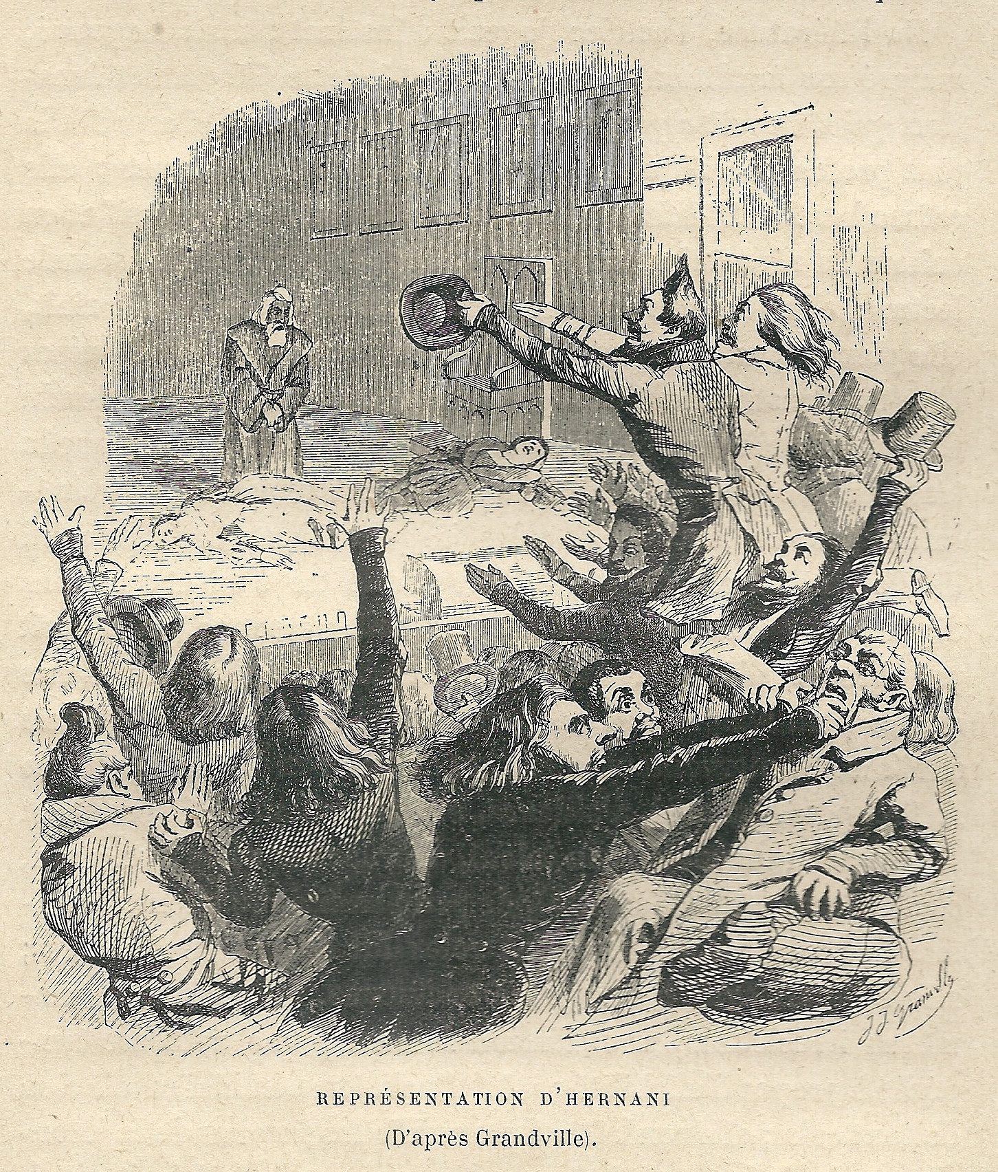 Bataille d'Hernani ; selon un dessin de Grandville